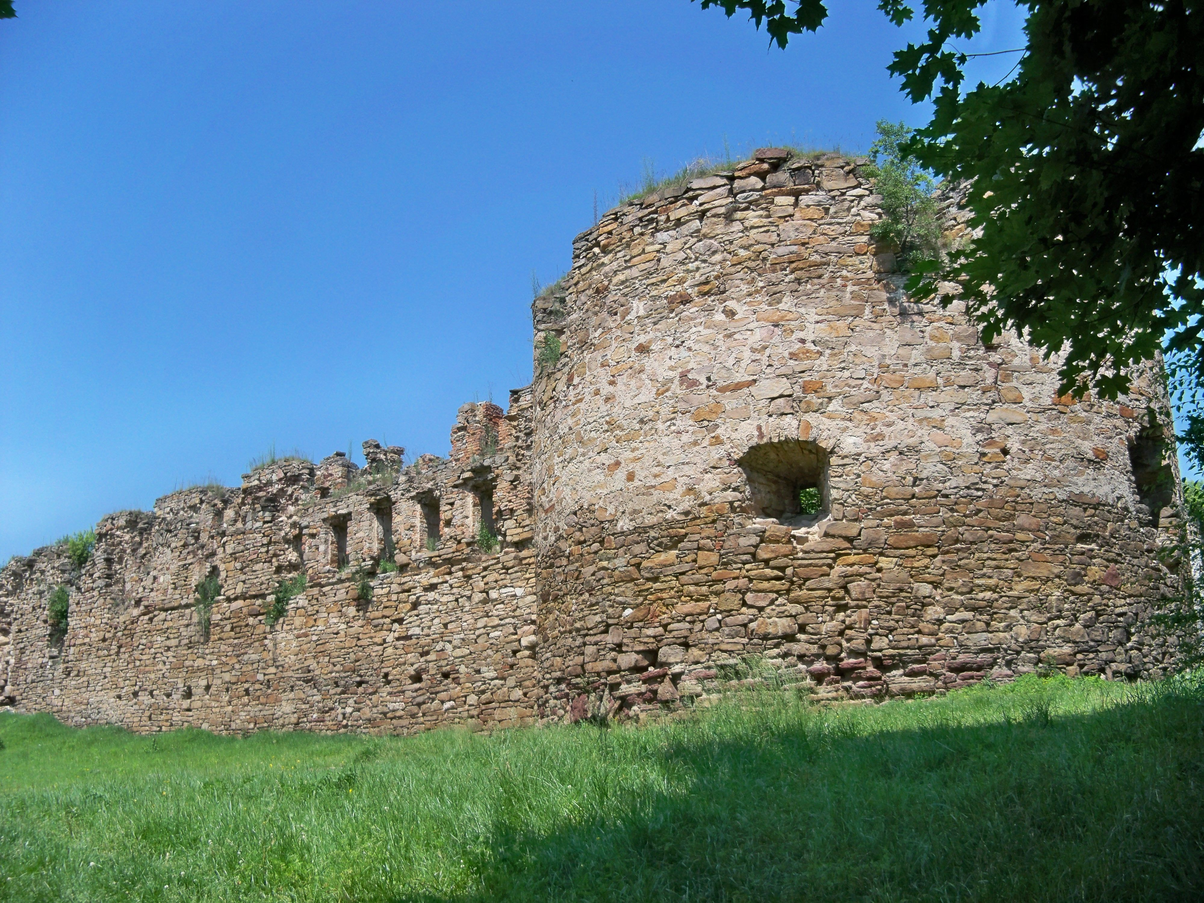 Замок, смт Микулинці, вул. Хоткевича, 2-а